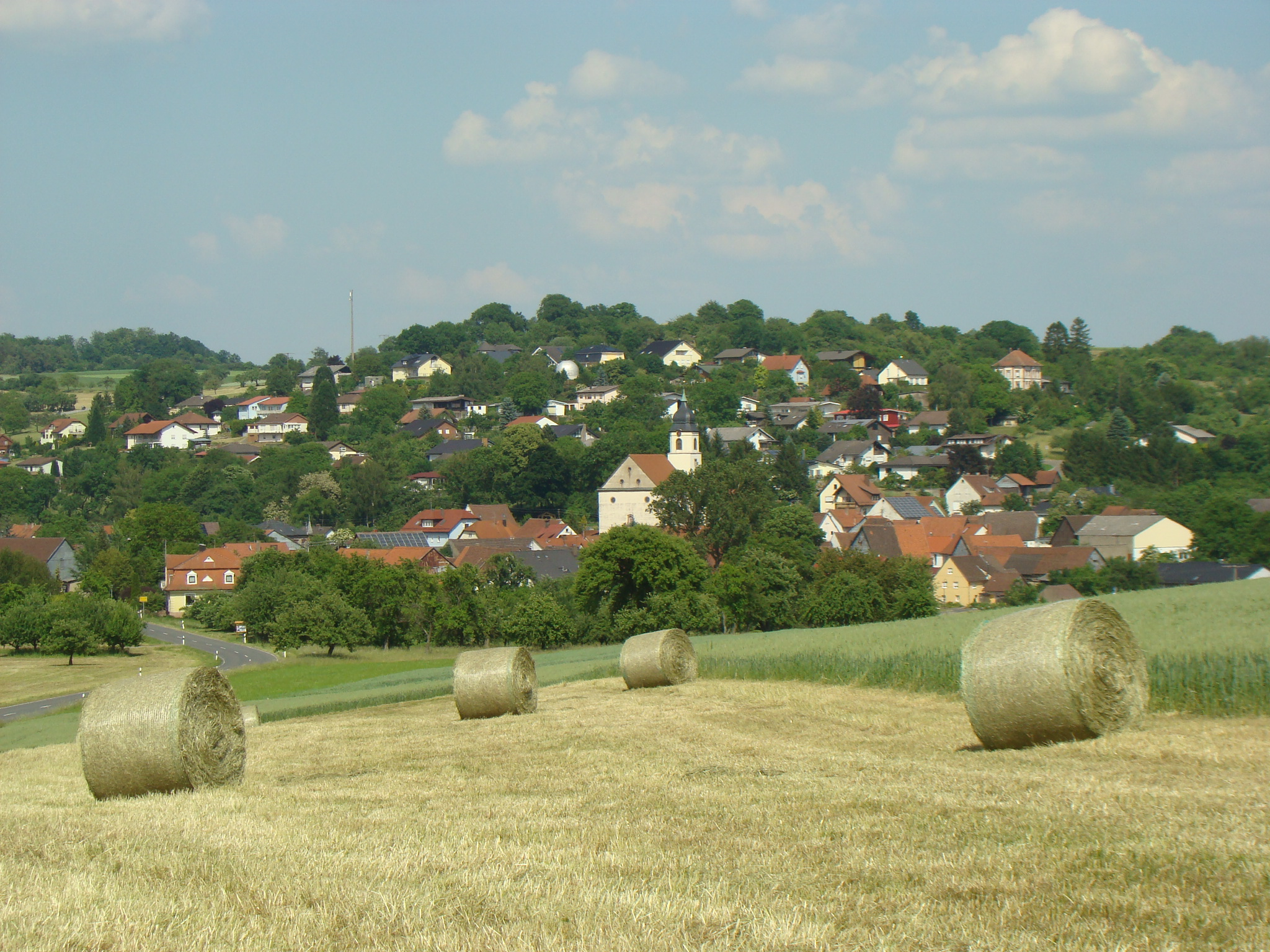 Oberwittstadt